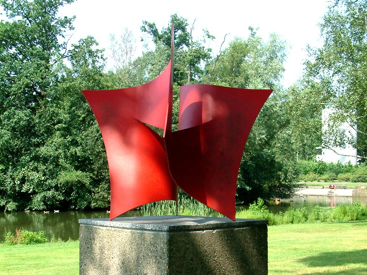 In het Stadswandelpark in Eindhoven. Kunstwerk: Dubbel Kwadraat, Kunstenaar: Margot Zanstra, 1980